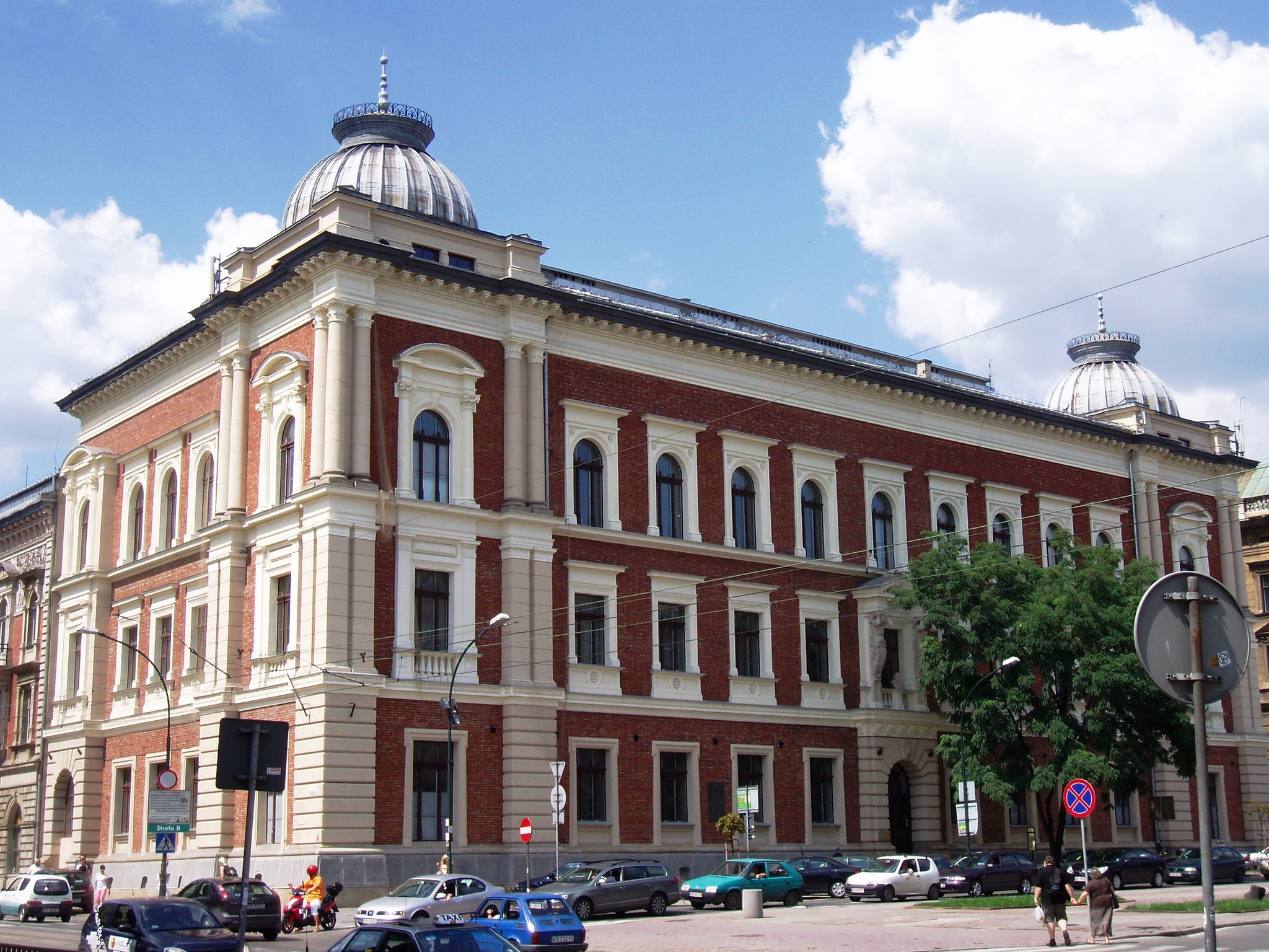 Akademia Sztuk Pięknych w Krakowie.